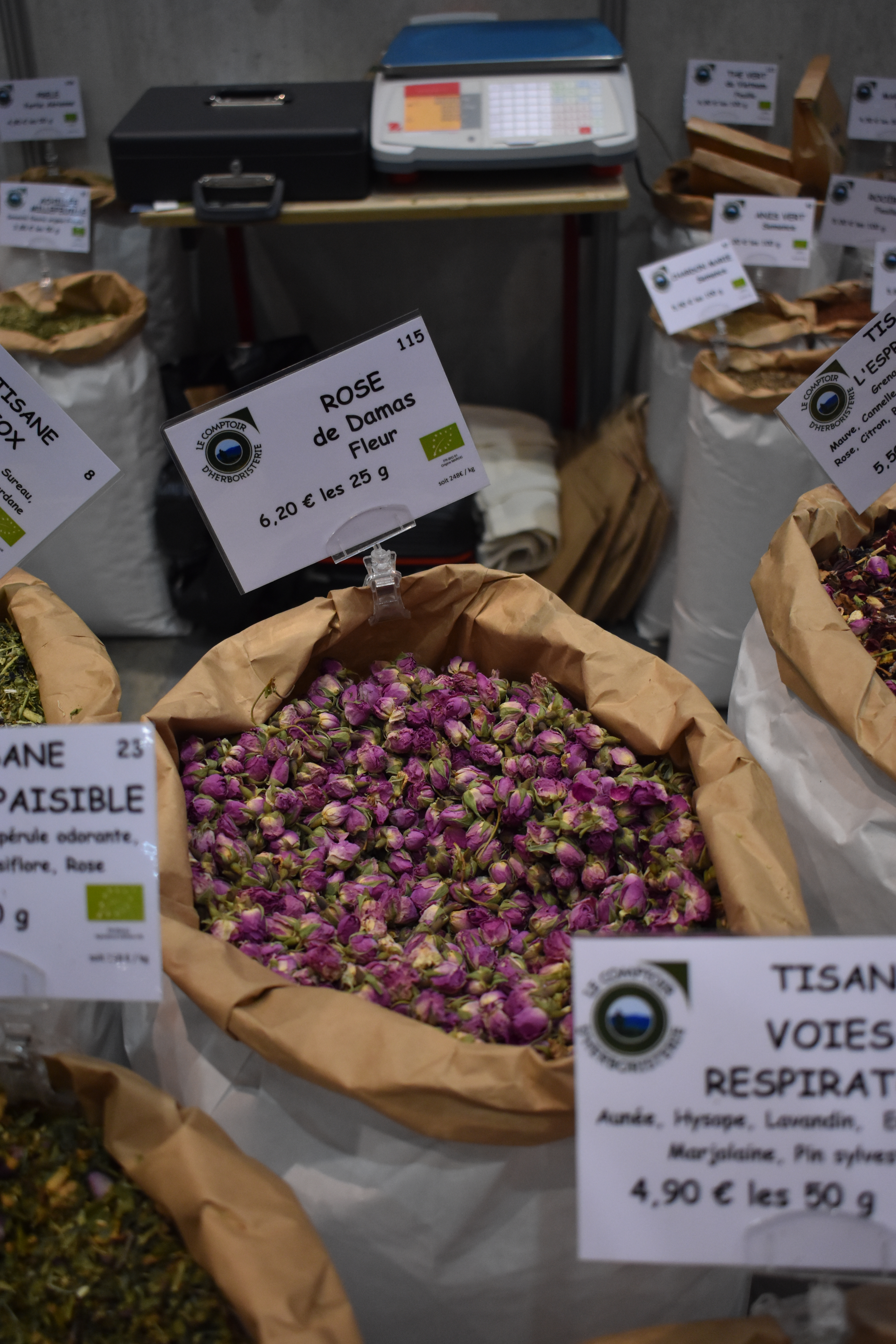 Roses de Damas à Primevère 2019.